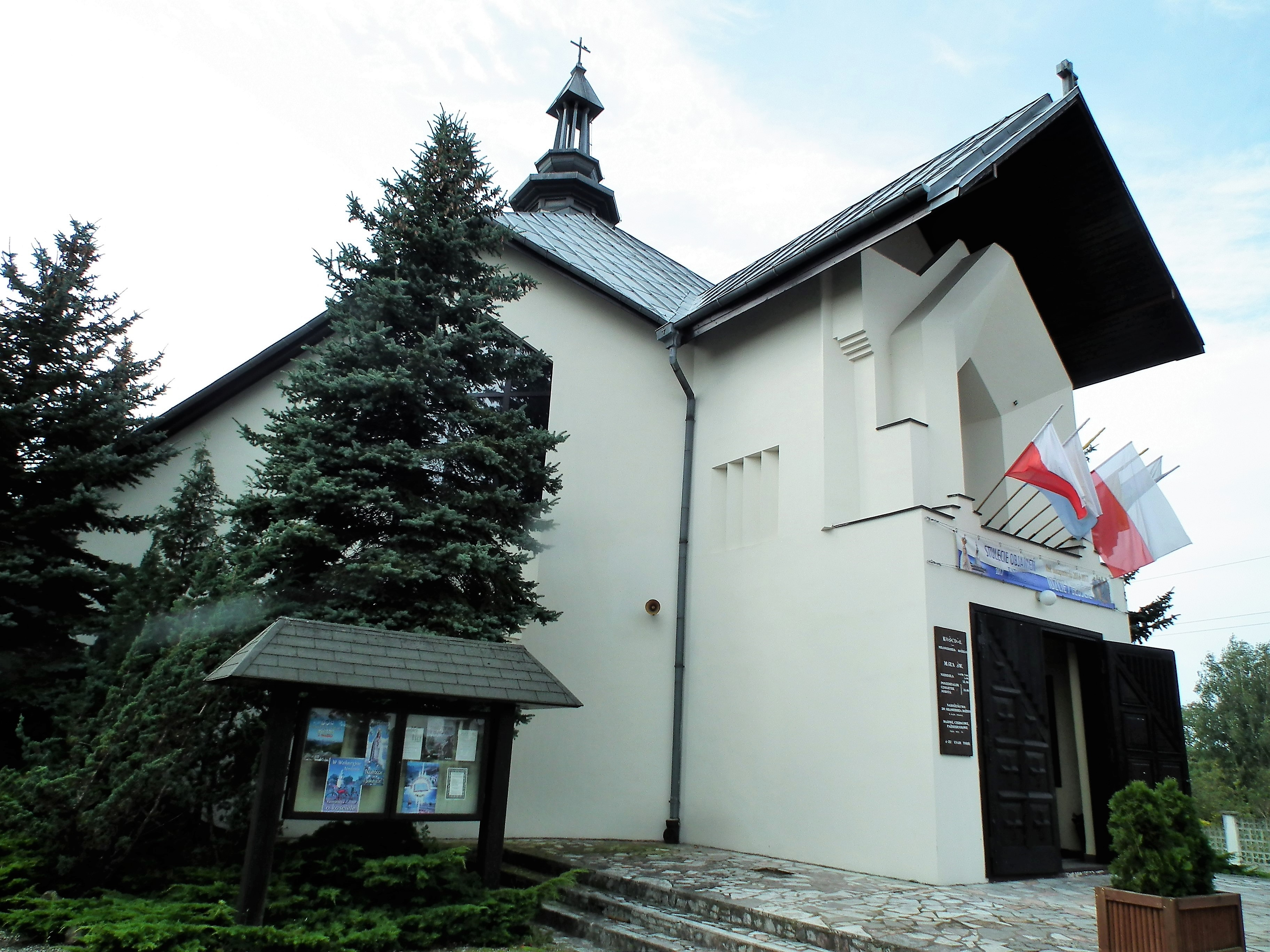 Kościół paraf. Miłosierdzia Bożego w Bobowicku.